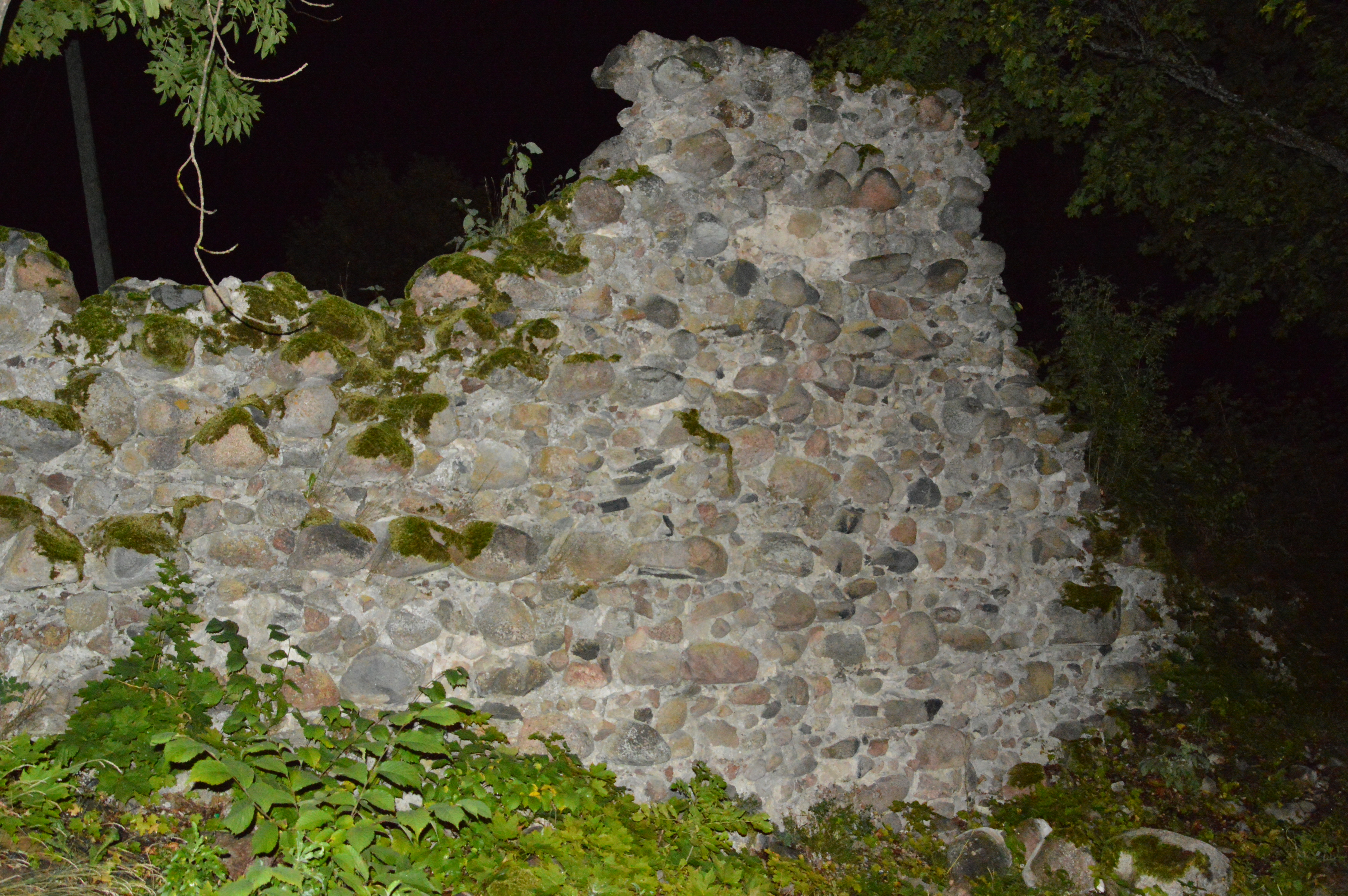 Smiltene piiskopilinnuse varemed. Säilinud läänesein.